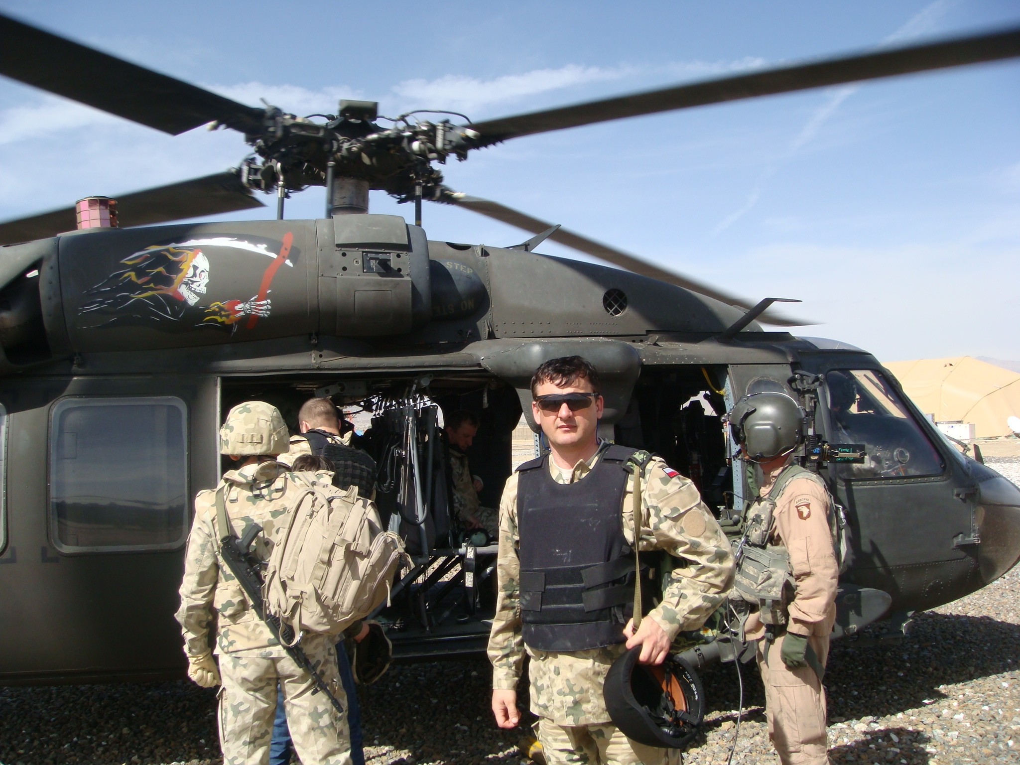 Jeden z wyjazdów delegacji MON do Afganistanu - 2009